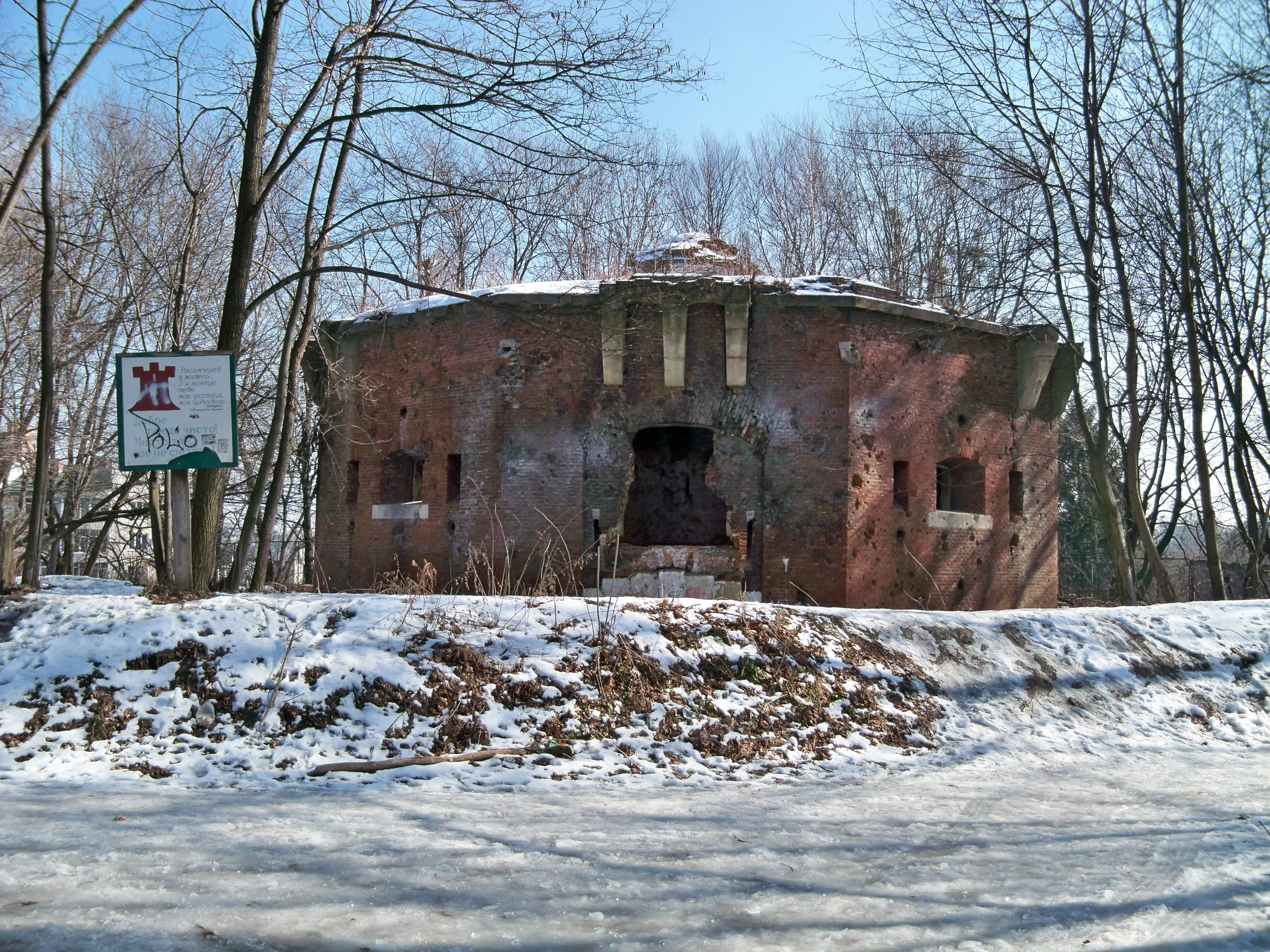 Фортечна споруда — Ансамбль оборонних споруд Цитадель на Калічій горі — місце концентраційного табору «Шталаг-328», Львів, Грабовського П., 11